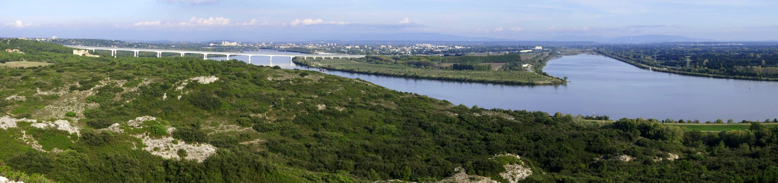 Confluent du Rhône et de la Durance (sud d'Avignon), vu de l'ouest. La Durance est à droite sur la photo. À gauche: viaduc du TGV Méditerranée (double viaduc des Angles). Dans le lointain à gauche: ville d'Avignon, où l'on distingue le Palais des Papes.